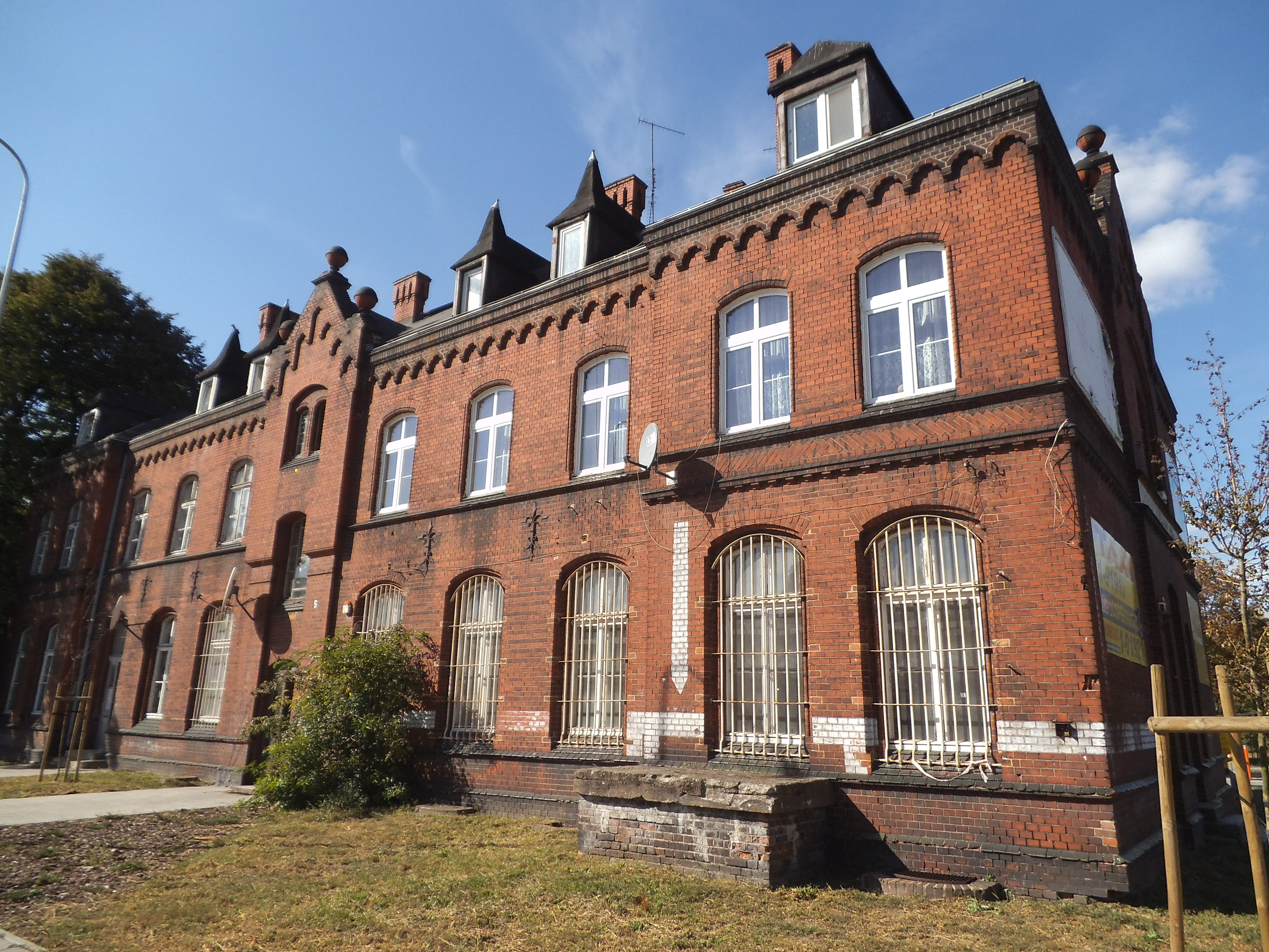 Budynek wielorodzinny przy ul. Kujawskiej w Toruniu